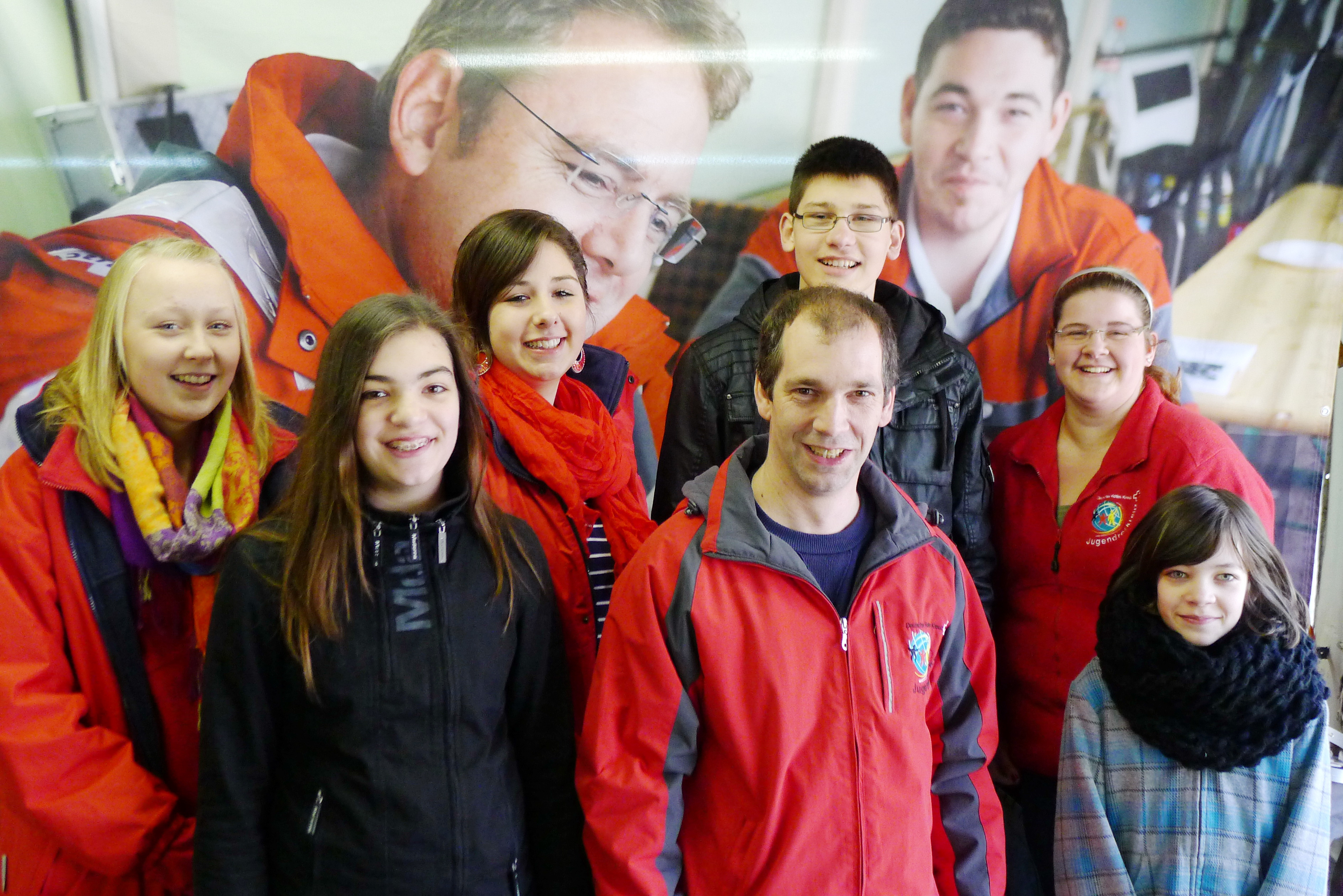 Die Projektgruppe Rotkreuz Museum vogelsang ip.